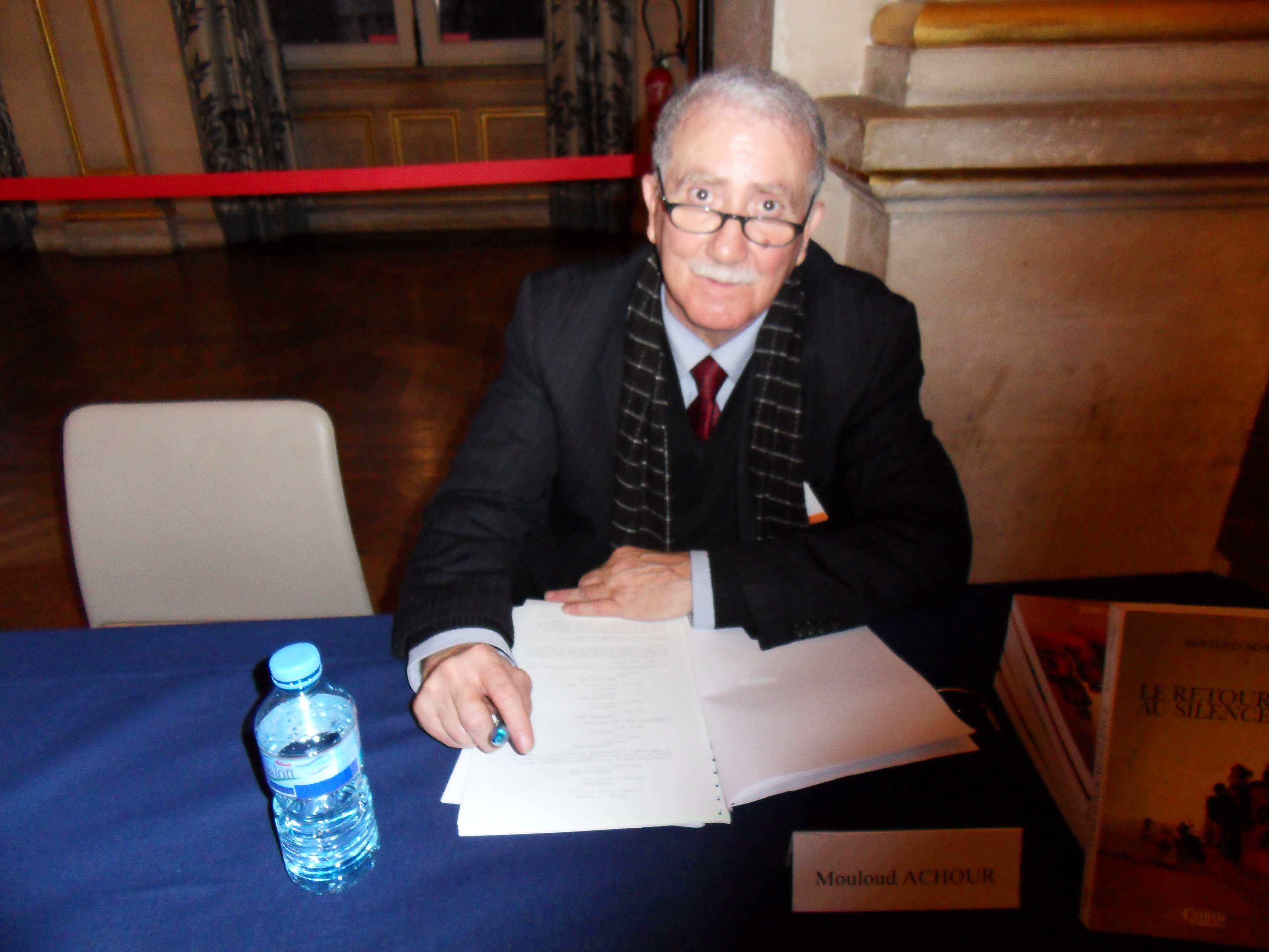 Maghreb des Livres, 11 février 2012 Mouloud Achour, Maghreb des Livres 2012